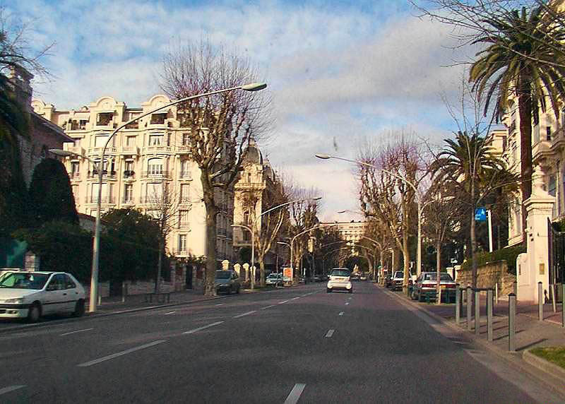 Nice - Quartiers de Nice Nice, quartier de Cimiez Bd de Cimiez, vue générale au croisement avec l'avenue Prince de Galles. Au fond, le palais Regina, ancien hôtel où séjourna la reine Victoria. Photo 01/2005 orientation Nord en montant